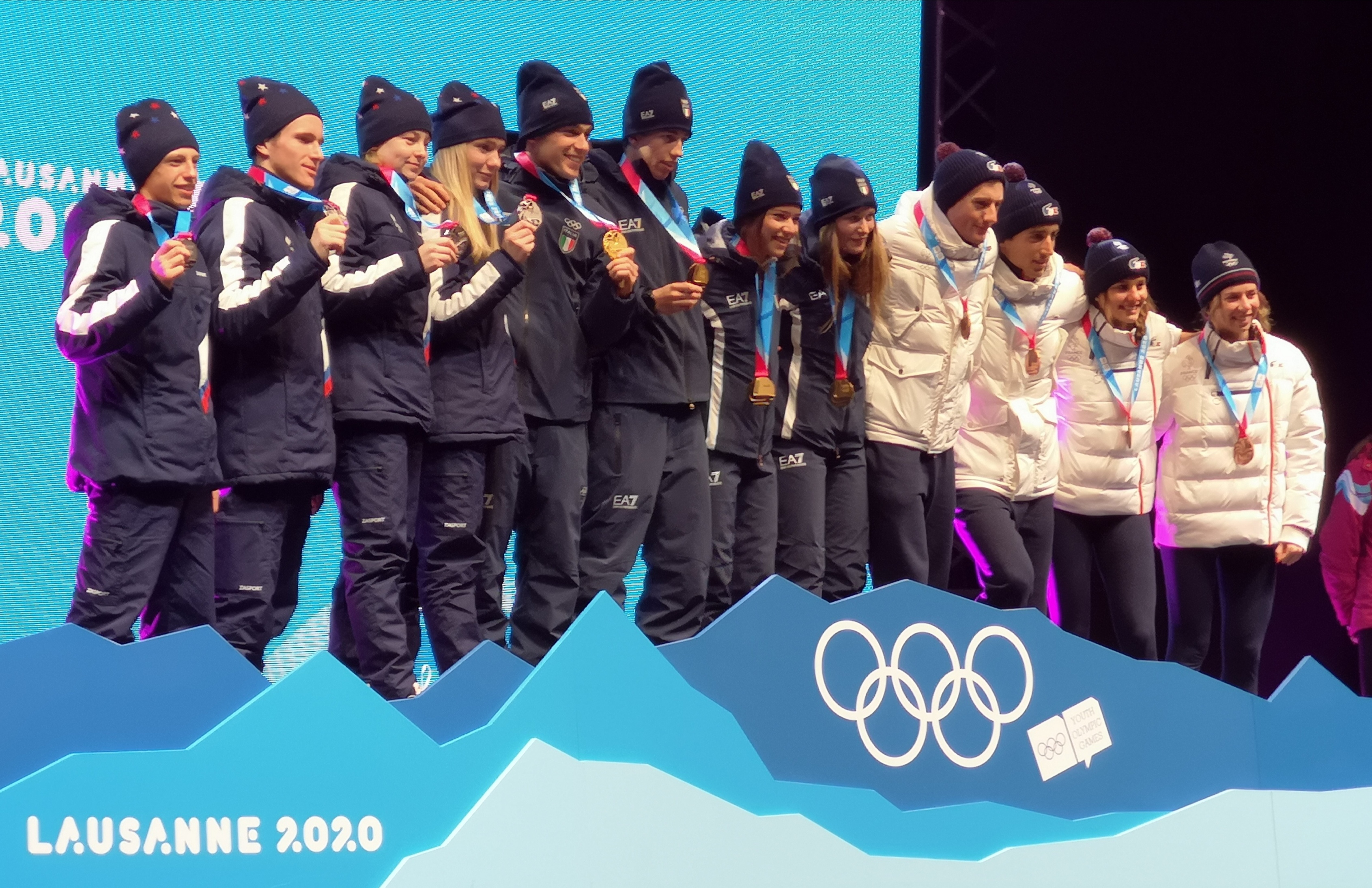 Le podium du relais mixte de biathlon des JOJ de Lausanne 2020 : Italie, Russie et France.